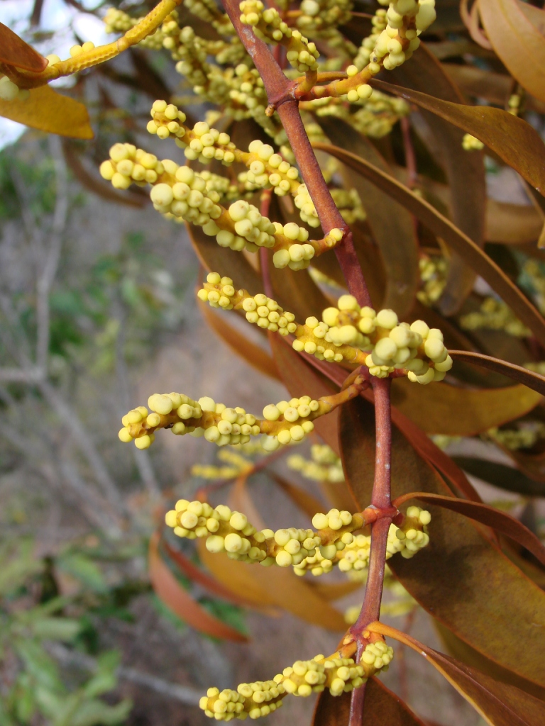 Phoradendron caripense - SANTALACEAE - Parque Estadual do Biribiri - Serra do Espinhaço - Diamantina - Minas Gerais - Brasil.